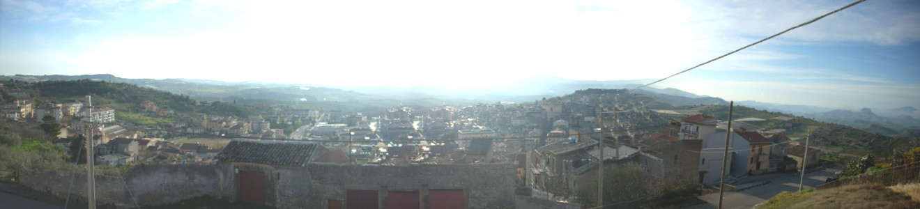 serradifalco